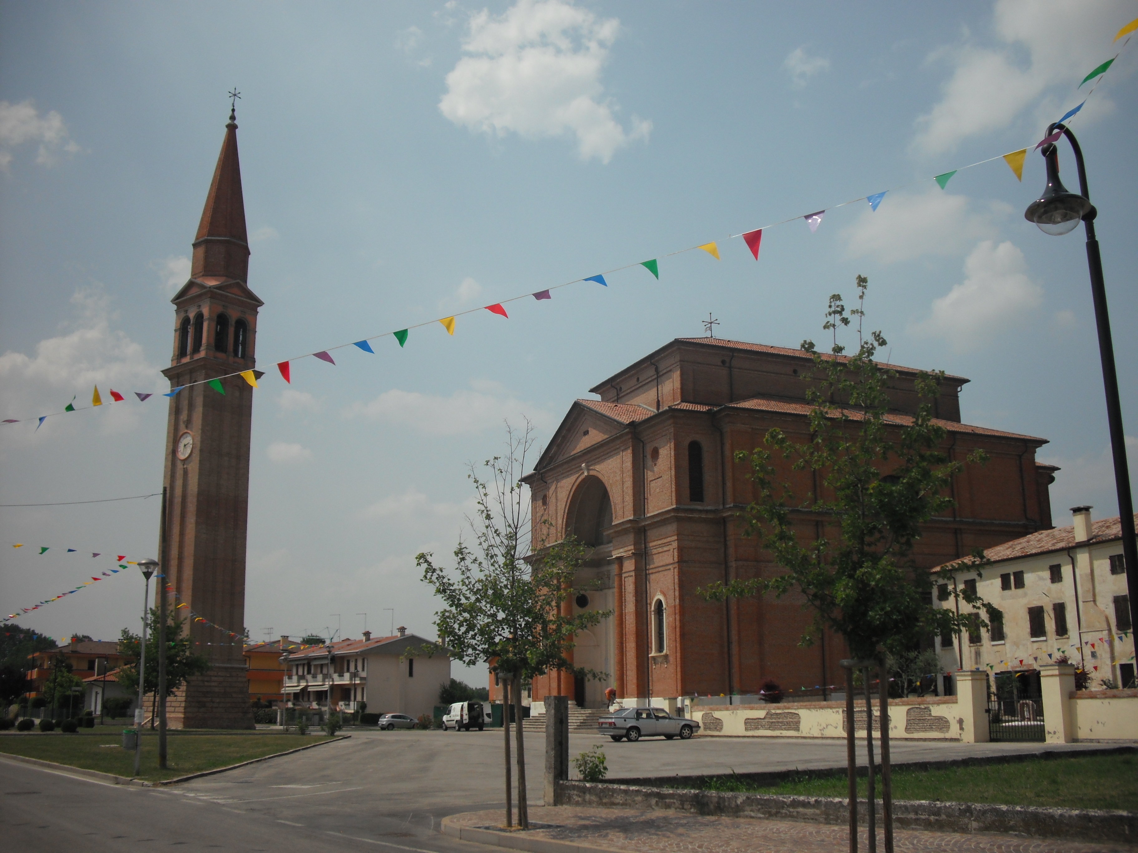 Parrocchiale di Morgano, in provincia di Treviso.